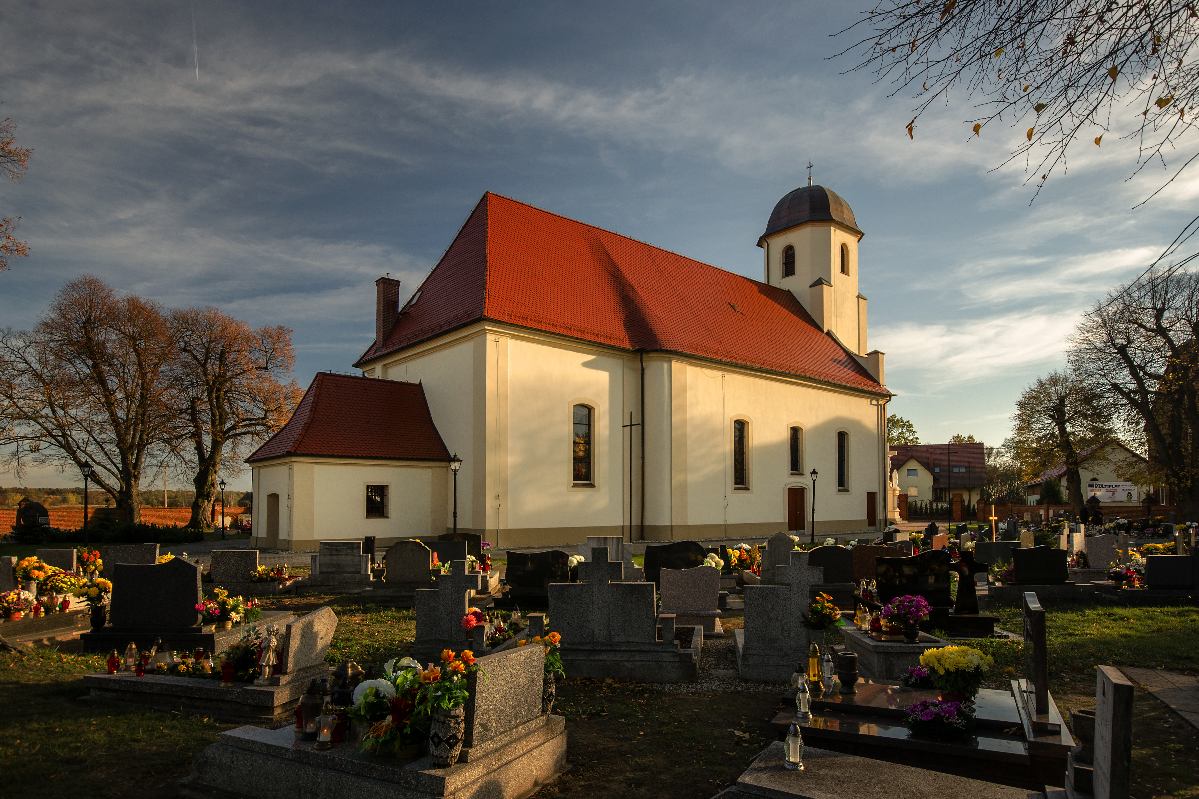 Stare Koźle, kościół, ob. par. pw. św. Jana Nepomucena, 1806-8, 1922 (na cmentarzu par.)